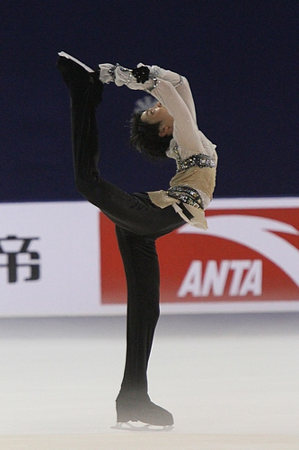 Юдзуру Ханю на Кубке Китая 2011.